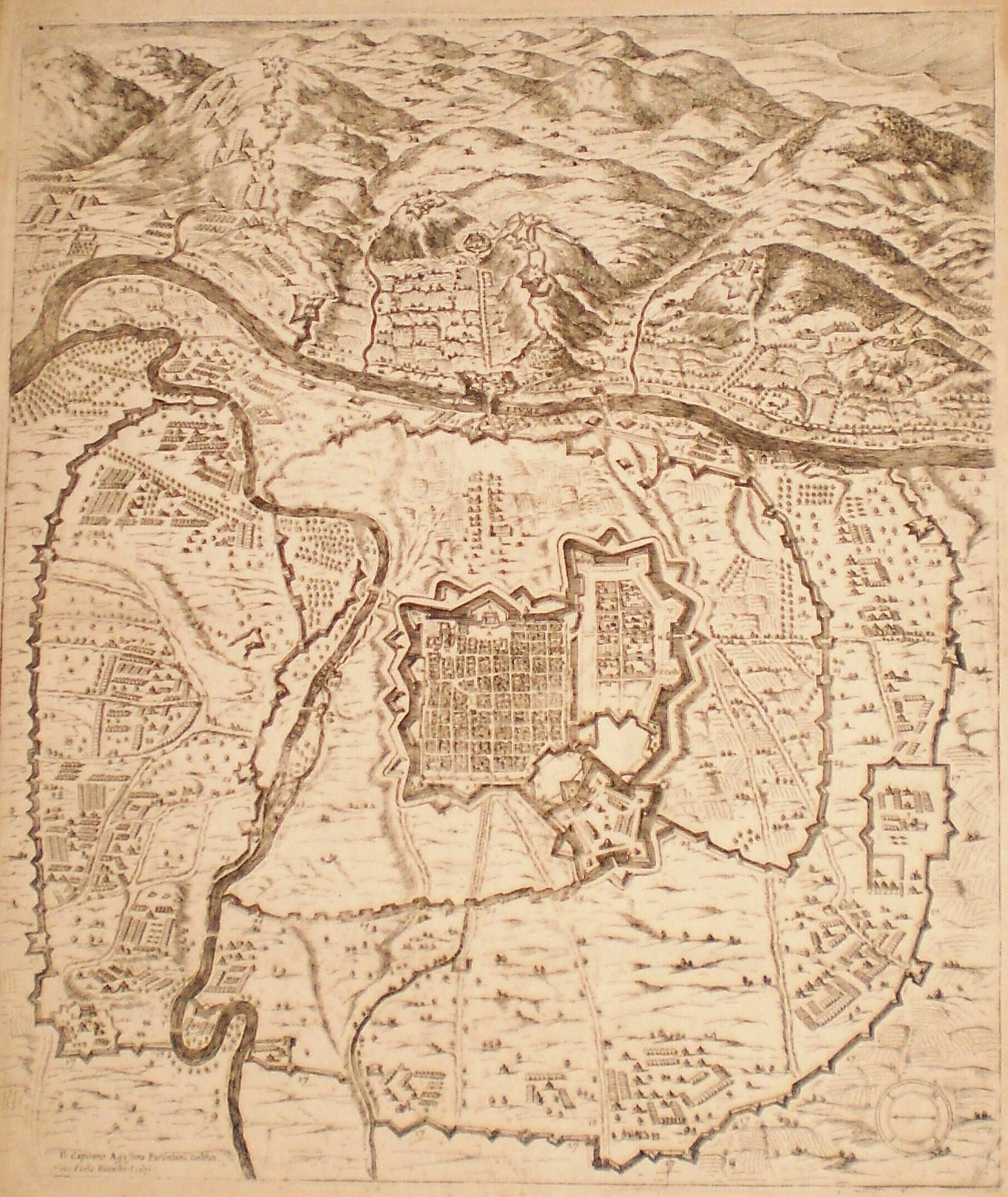 Vista a volo d'uccello di Torino, probabilmente stampata in Germania nel XVI-XVII secolo. Dall'archivio della libreria antiquaria Bourlot di Marco Birocco, Torino